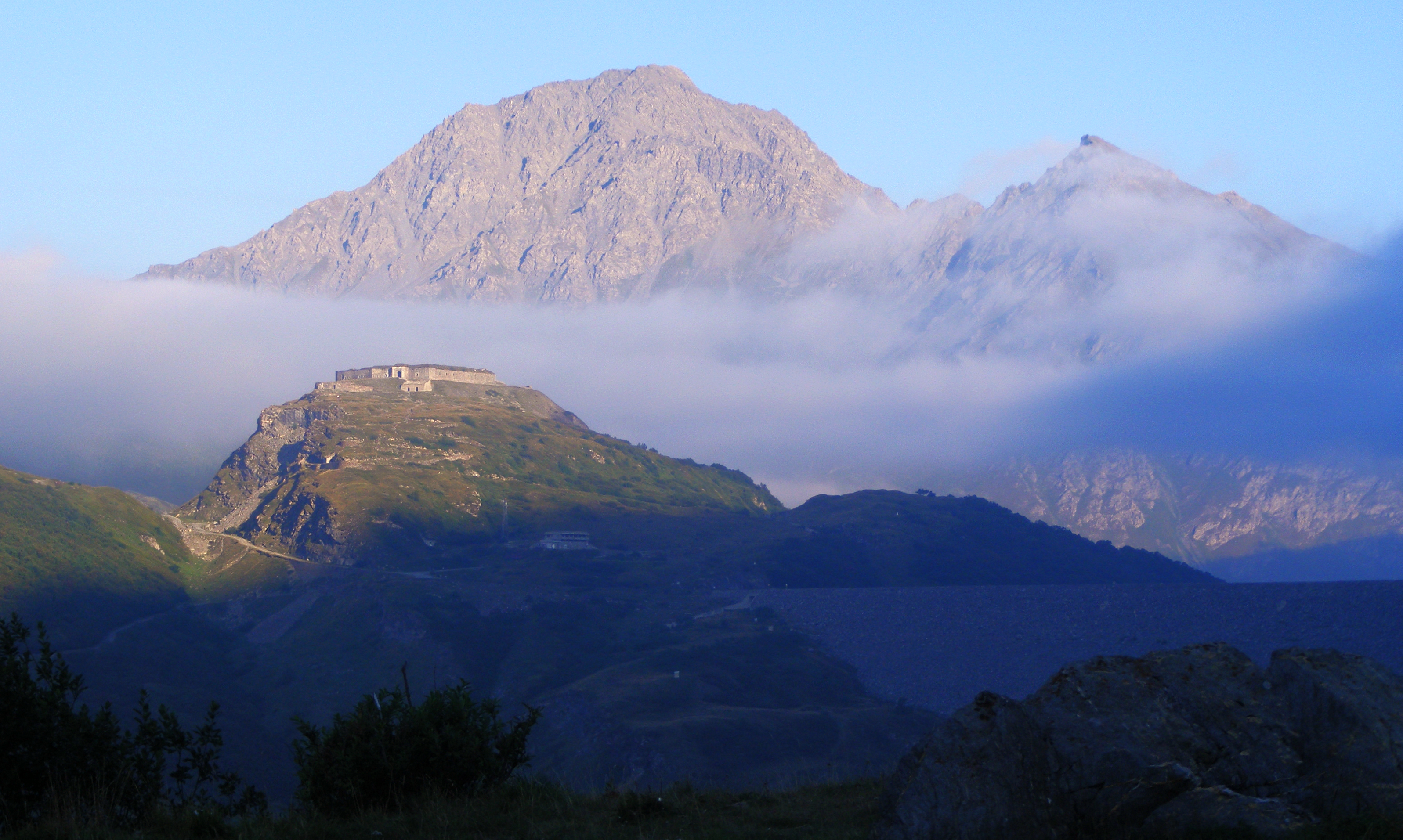 Il Forte Varisello con la Punta Clairy (Alpi Cozie)